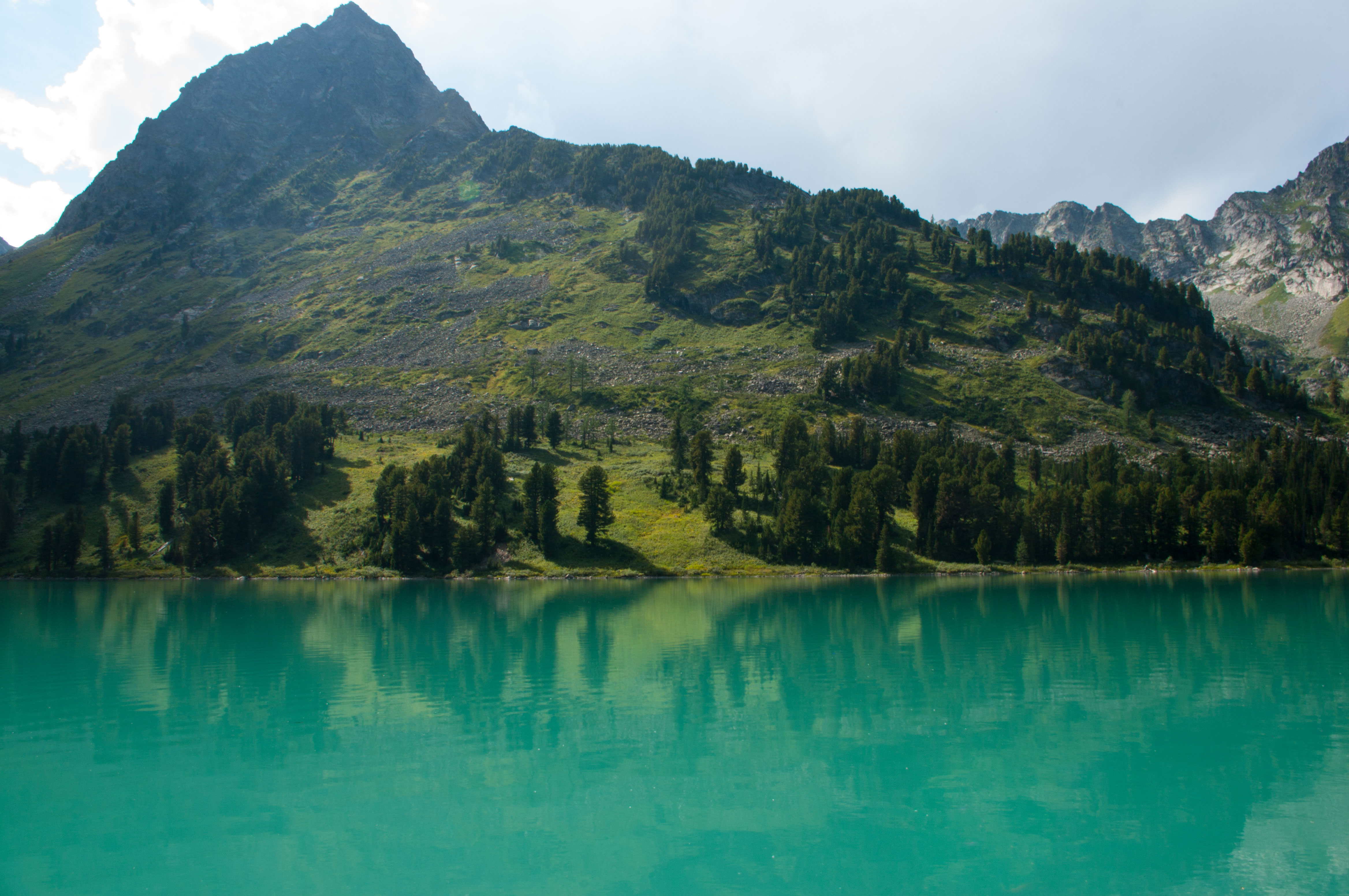 Мультинские озера, Усть-Коксинский район This image is related to the protected area of Russia number 0410044